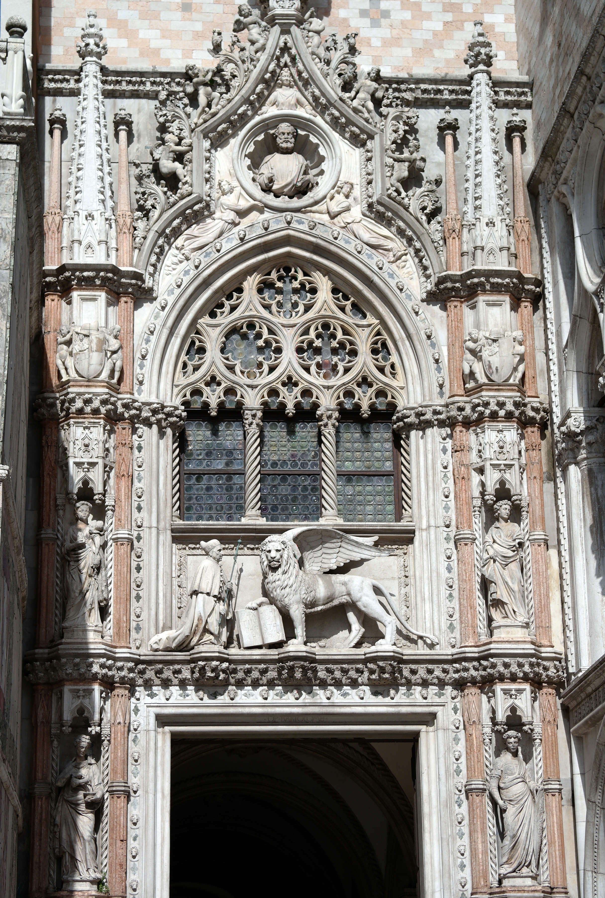 Dettagli della Porta della carta, ingresso monumentale del Palazzo ducale